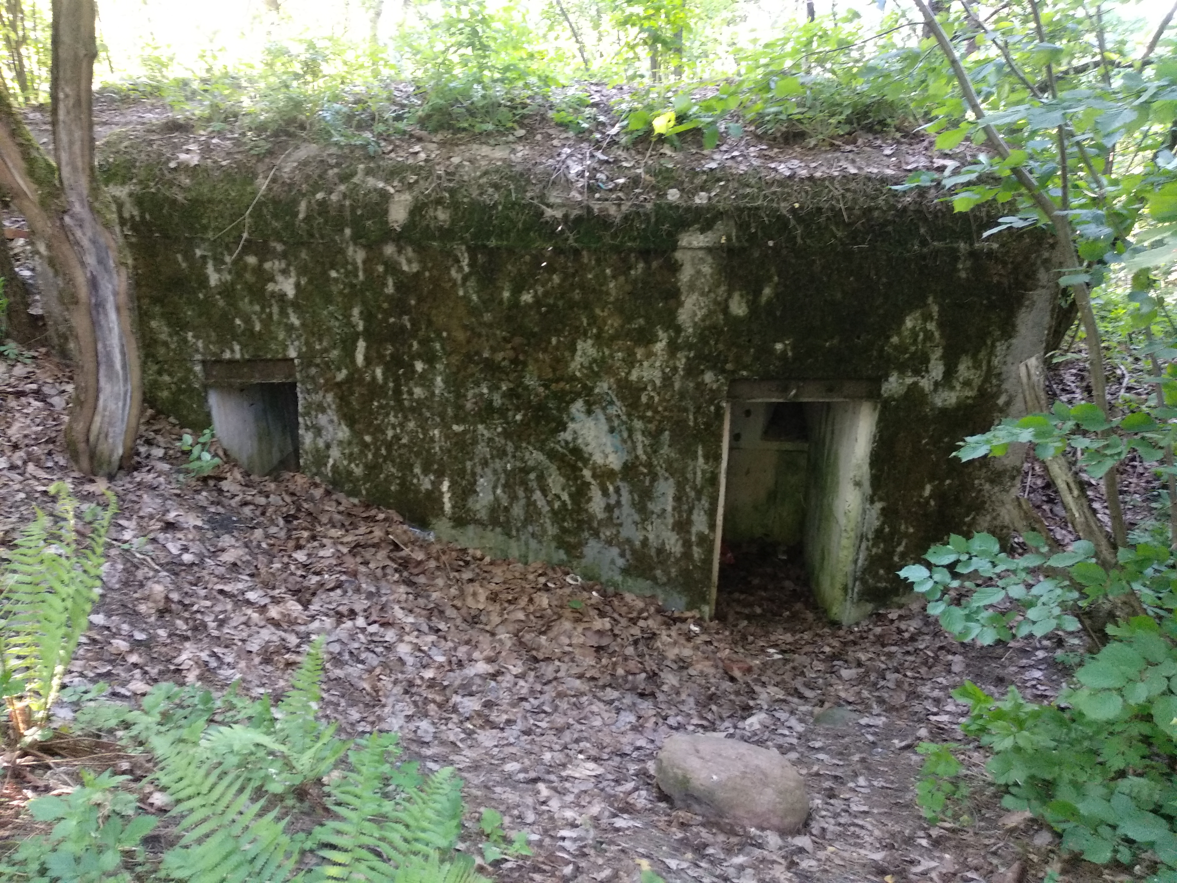 Zukauka, Minsk region